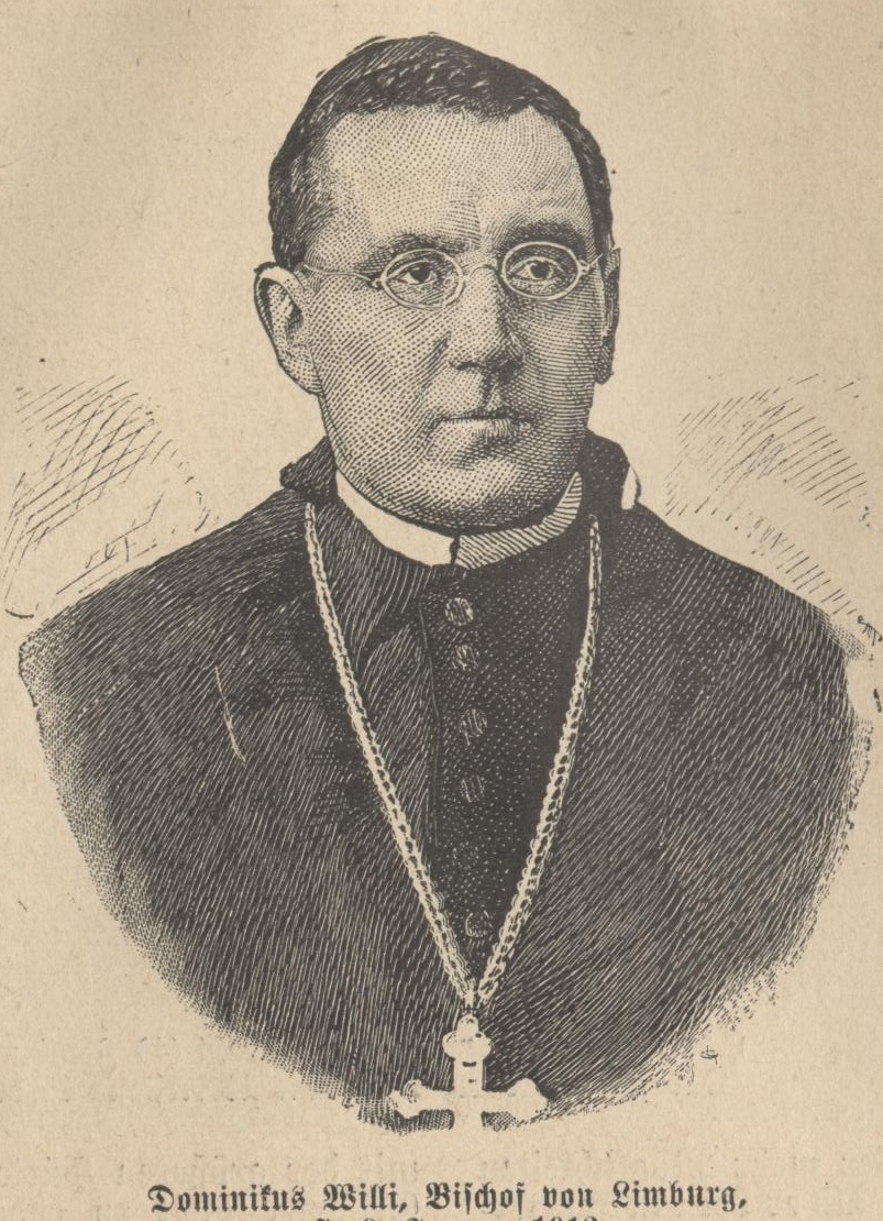 Stich, Dominikus Willi, Bischof von Limburg